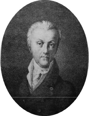 Jan Petr Cerroni (1753 - 1826), Moravský historik a archivář.